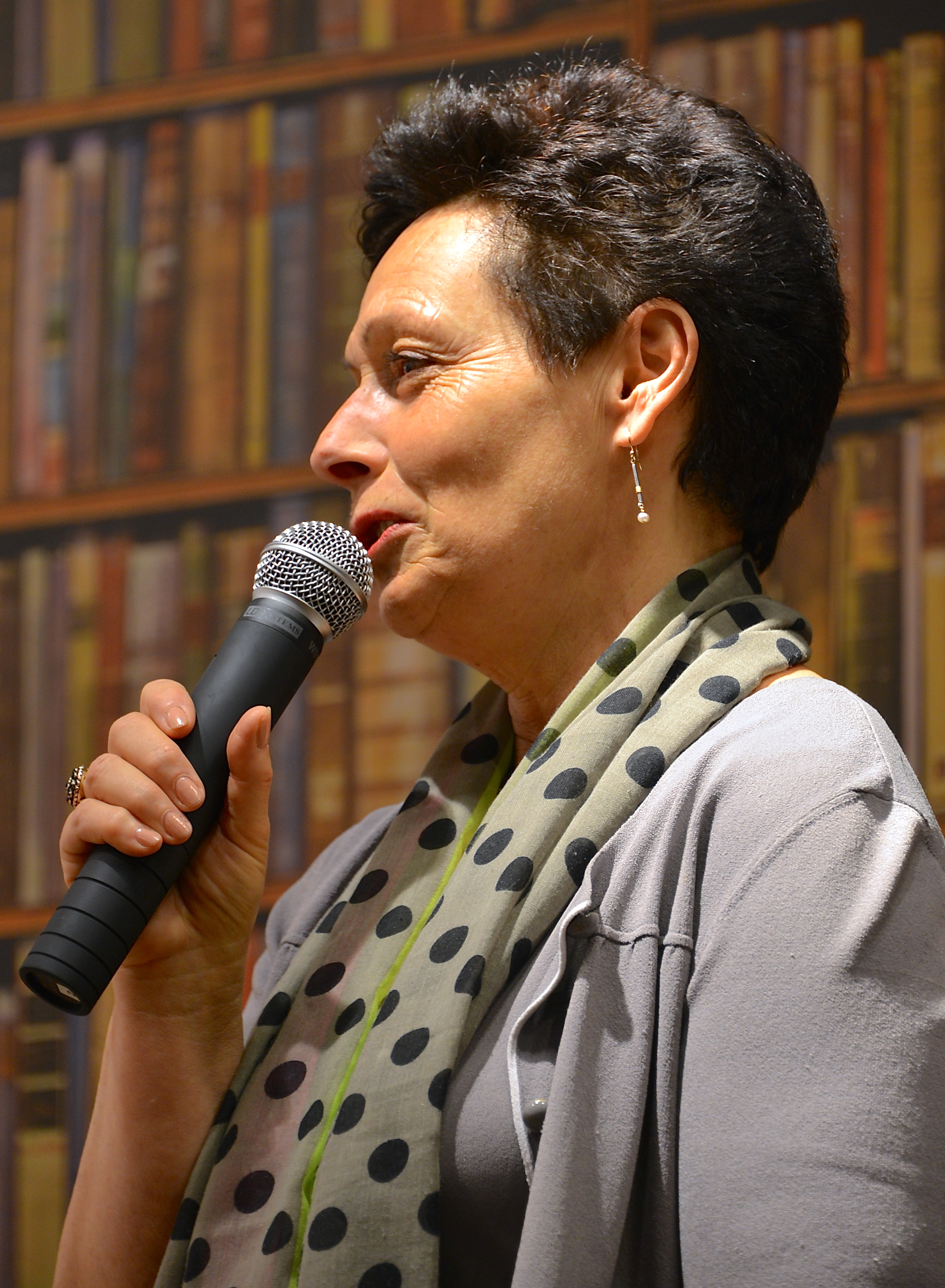 Dorotea Bromberg på Akademibokhandeln City, Stockholm den 27 april 2013.